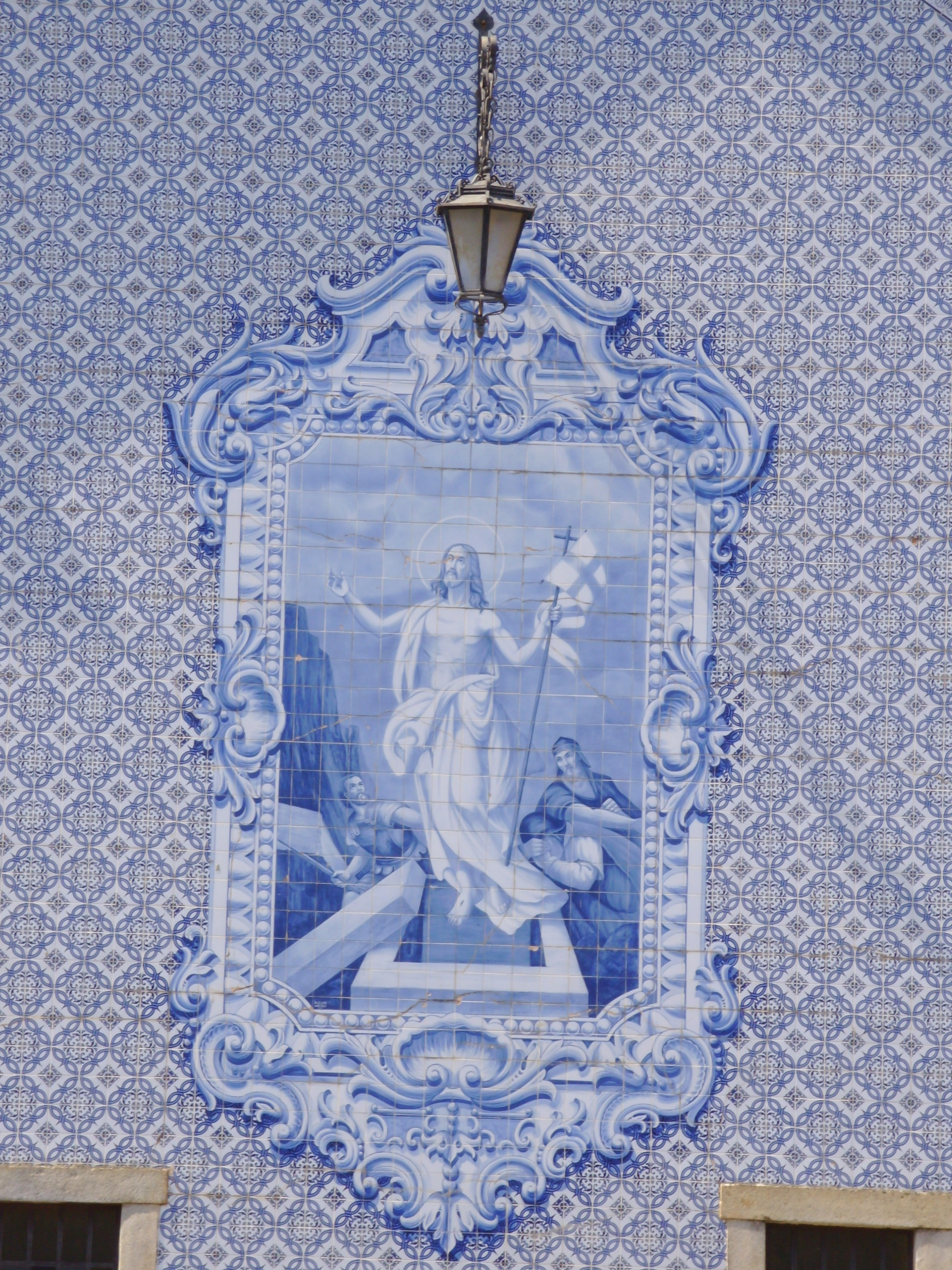 Igreja de Santa Marinha de Cortegaça, concelho de Ovar, distrito de Aveiro, Portugal: detalhe do painel de azulejos no alçado dos fundos.